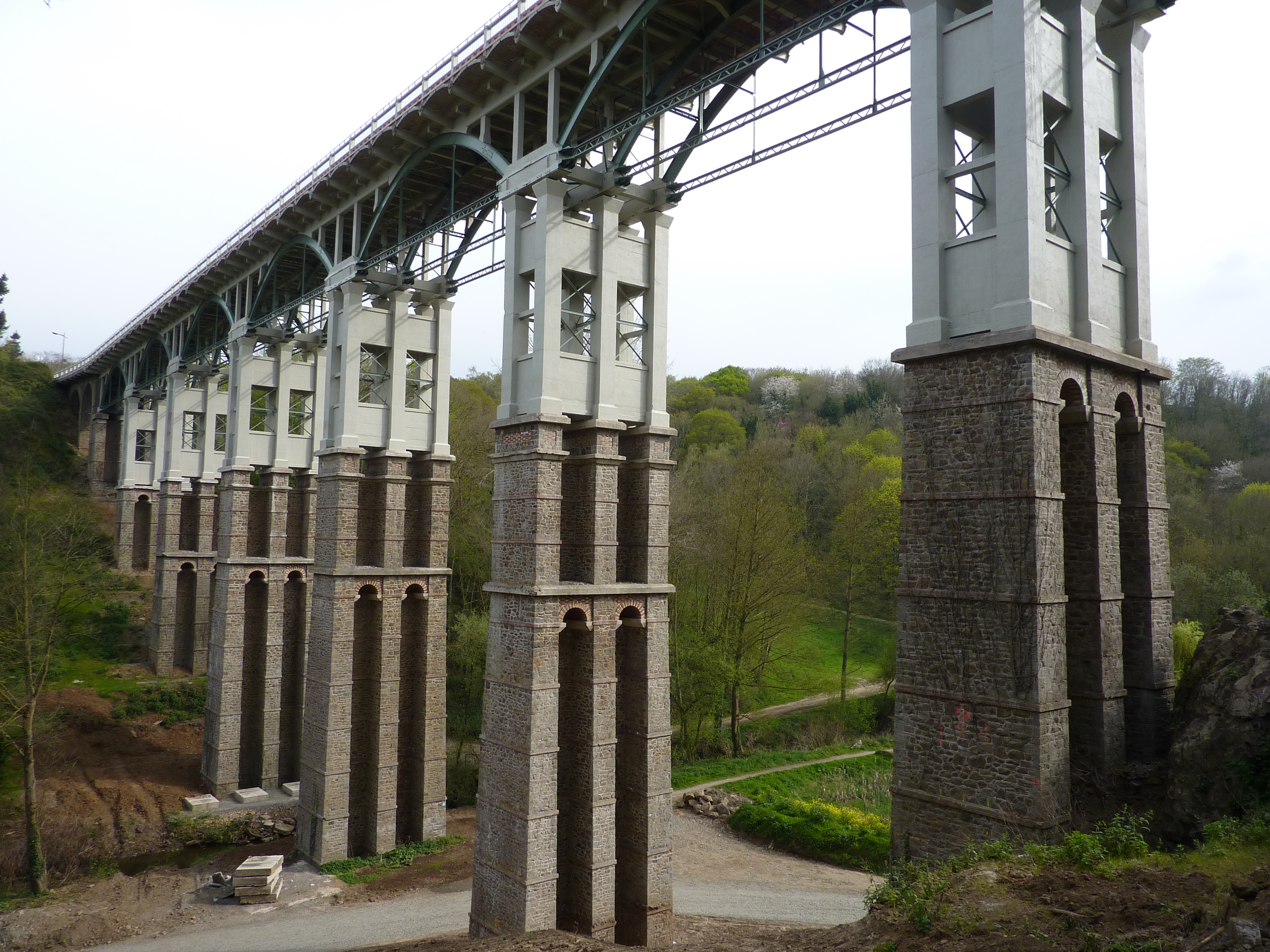 Le viaduc de Toupin à Saint-Brieuc.